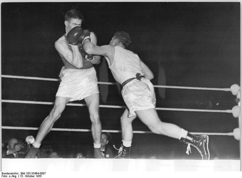 Murauskas, R. Redrup Zentralbild Sport & General Gey-Ho. 9 Motive 15.10.1955 Boxländerkampf England-UdSSR 4:16. Zu einem eindrucksvollen Sieg kam die sowjetische Boxstaffel am Mittwoch in London beim Länderkampf gegen England. Der Gastgeber musste sich im Gesamtergebnis mit 16:4 hoch geschlagen bekennen. UBz: Zu einem Punktsieg kam der sowjetische Halbschwergewichtler Murauskas (links) gegen R. Redrup. Der spätere Sieger blockt eine Linke von Redrup ab.